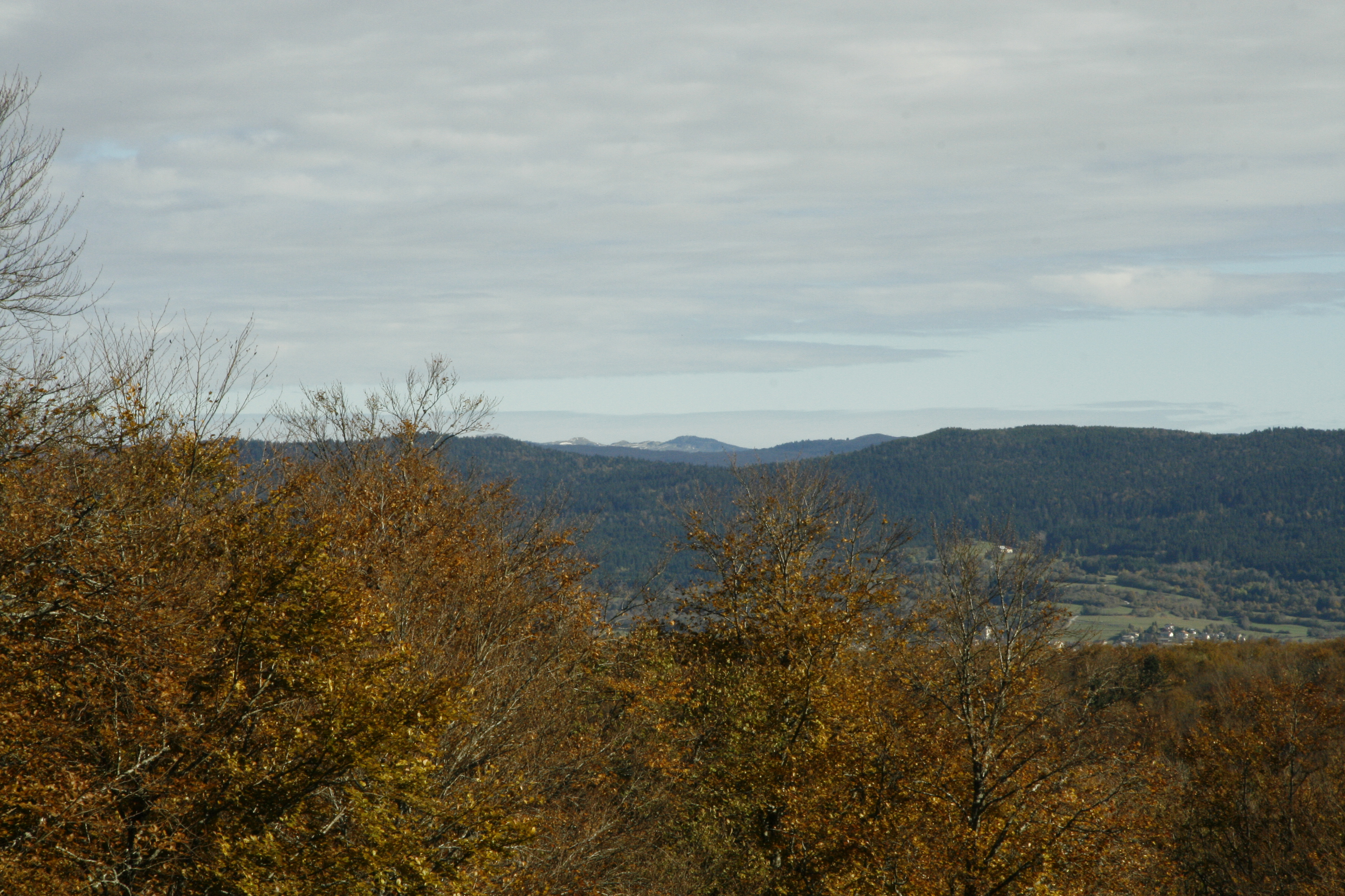 Vue Nord Nord Est du sommet du Tré pellay ; Rougemont en contrebas ; au loin les sommets du Jura.